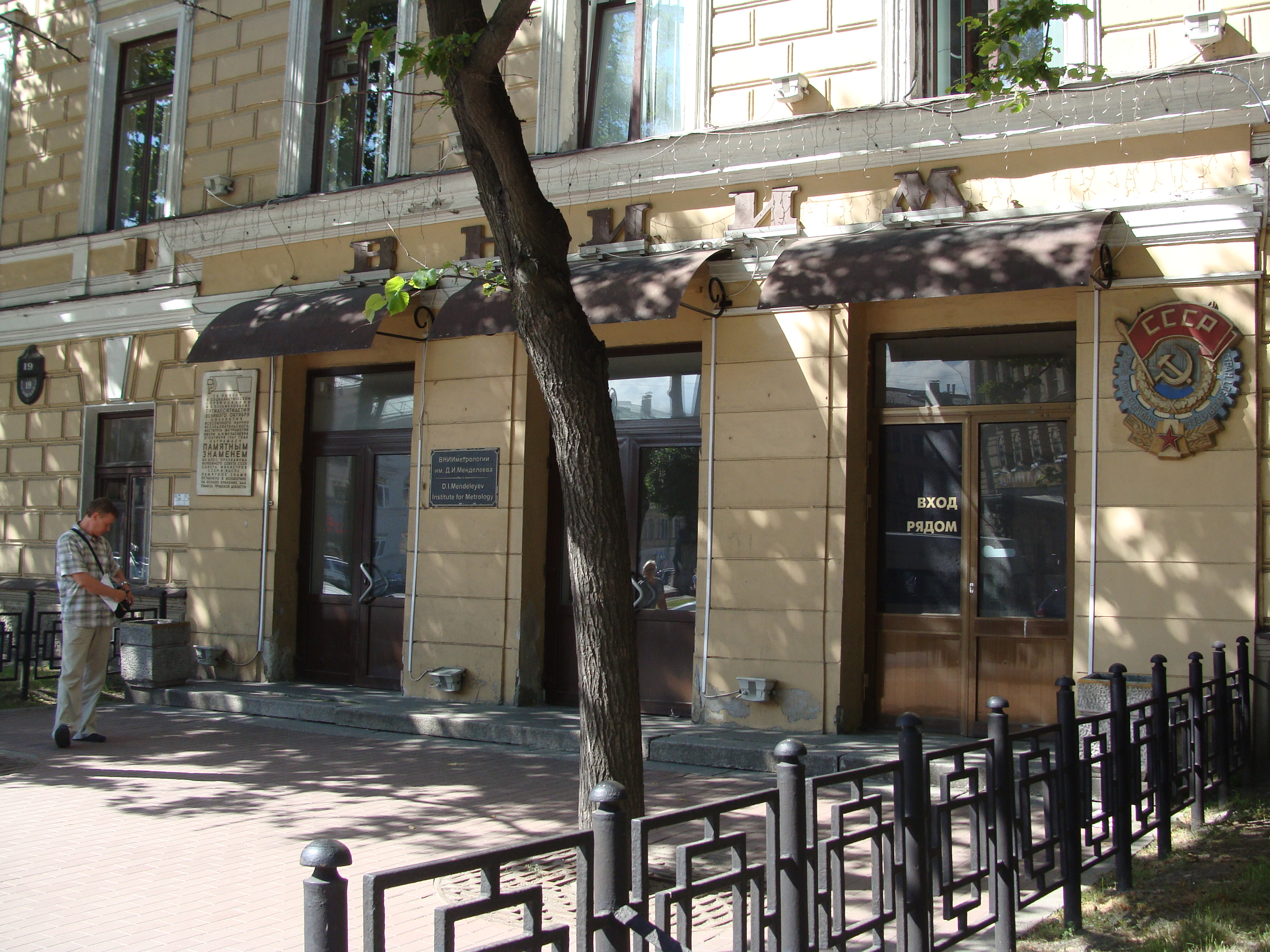 Всероссийский научно-исследовательский институт метрологии